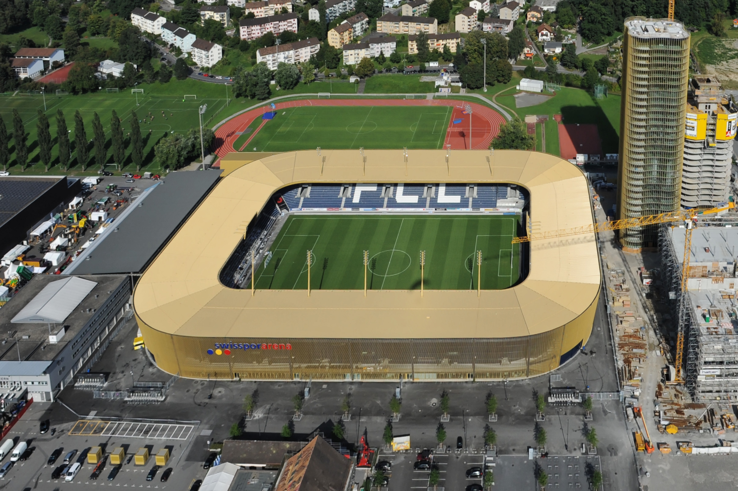 Luftaufnahme der swissporarena in Luzern.